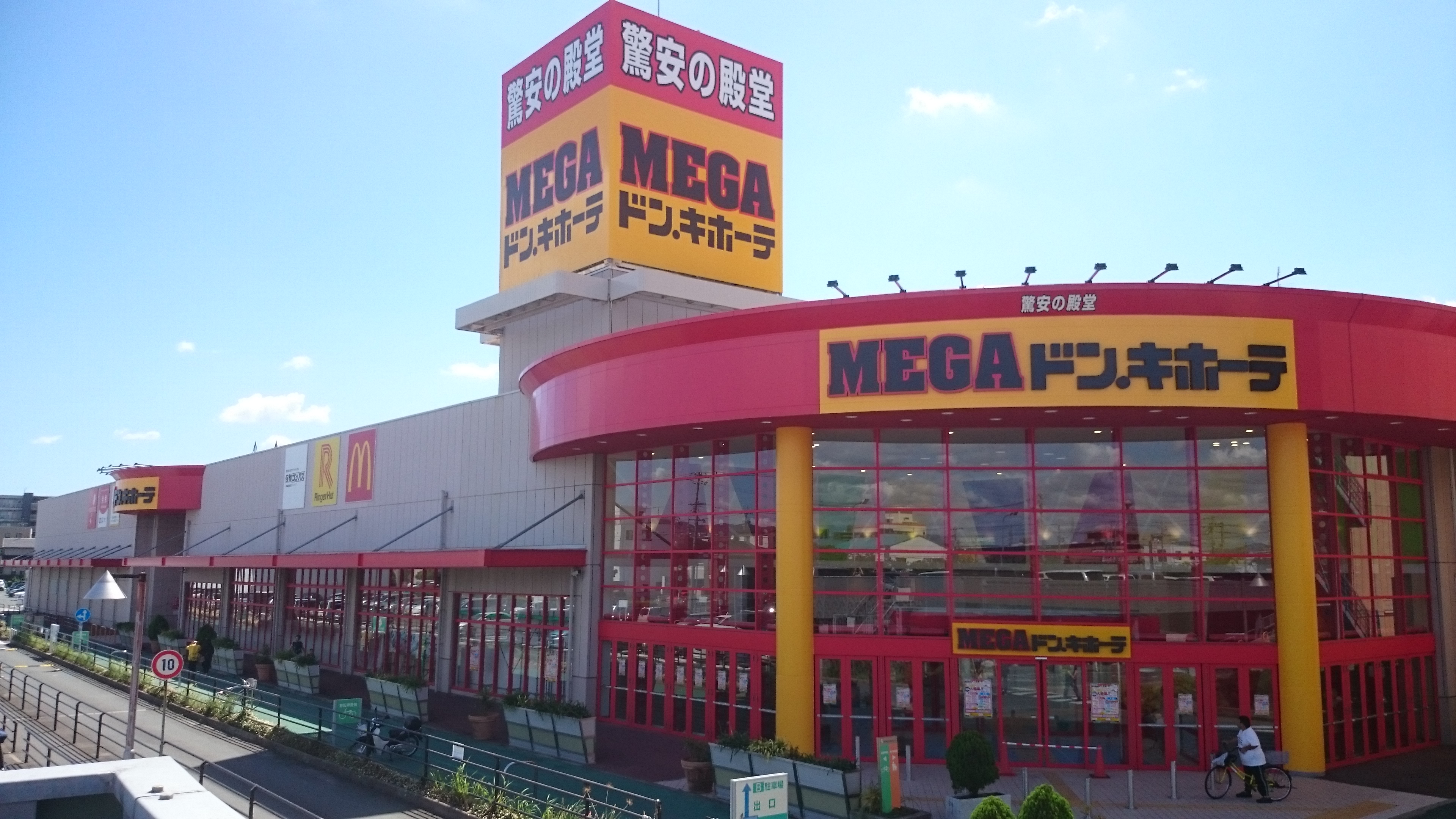 2017年9月18日撮影